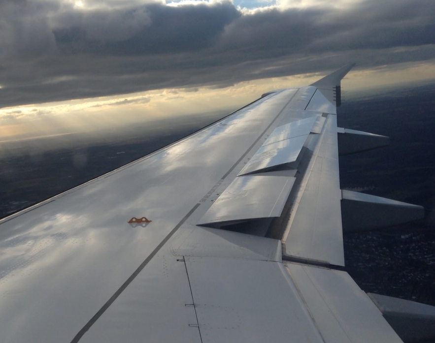 Einige Störklappen eines Airbus A319-112 (D-AGWQ) der Germanwings im Sinkflug auf Hannover.